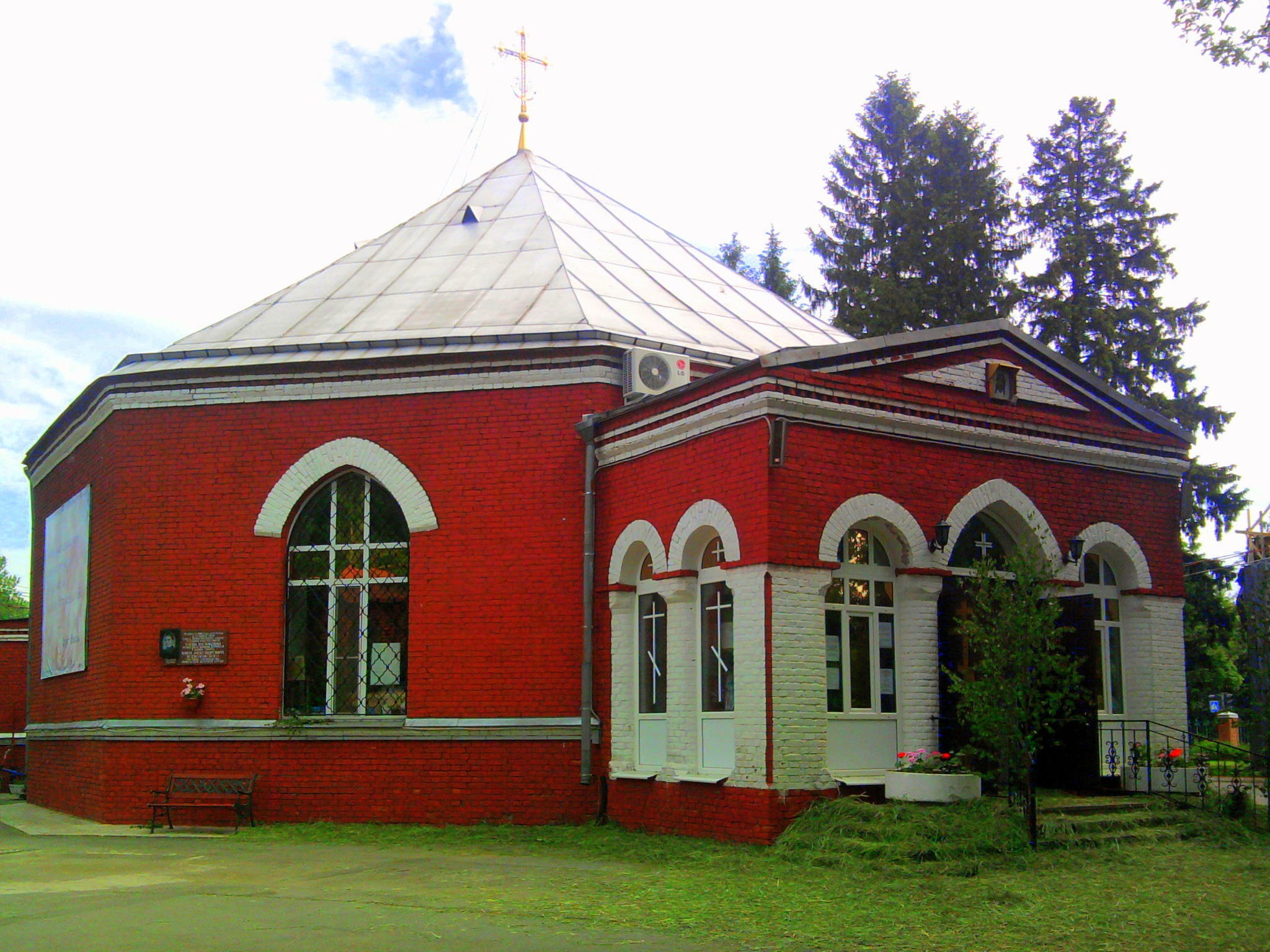 Храм Спаса Нерукотворного образа на Дороге Жизни в праздник Святой Троицы